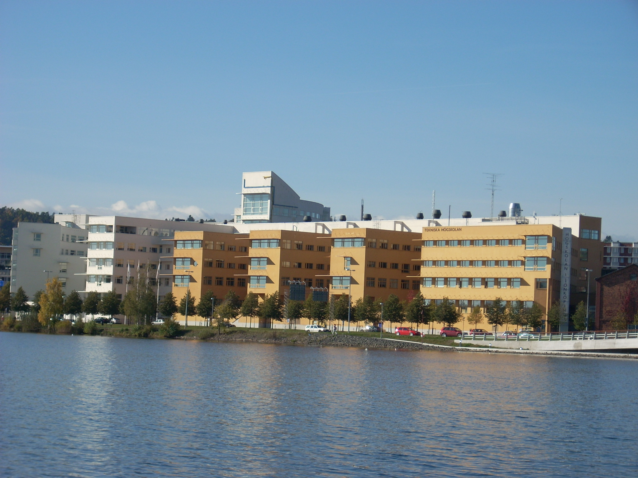 Högskolan i Jönköping med Munksjön i förgrunden